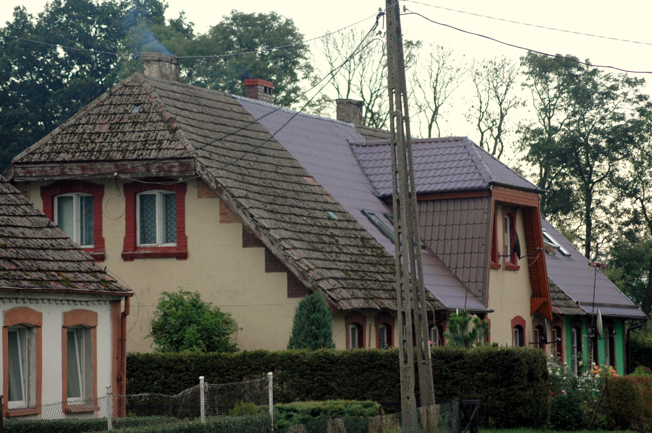 Dom w Uninie.